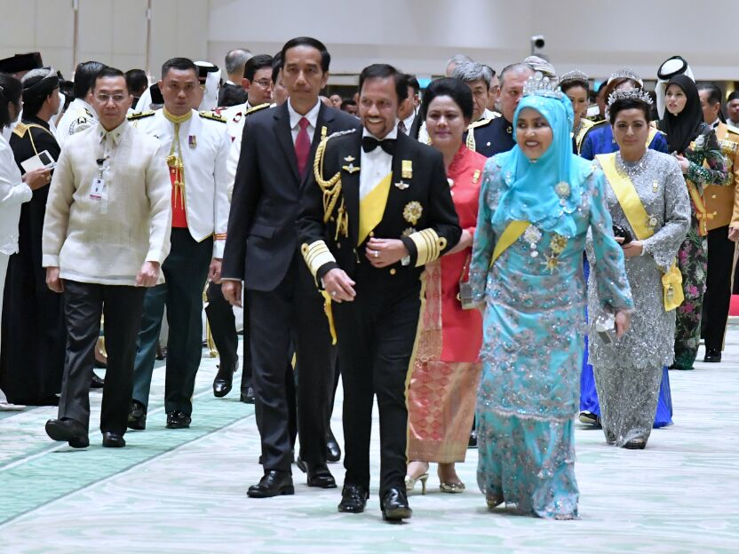 Keroncong Kemayoran di Perayaan 50 Tahun Sultan Hassanal Bolkiah Bertakhta